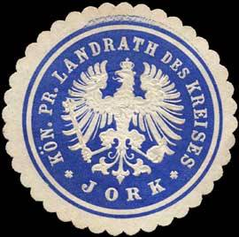 Sealing stamp Title: Königlich Preussischer Landrath des Kreises - Jork Description: blau, weiß, geprägt Place: Jork size: 4 cm